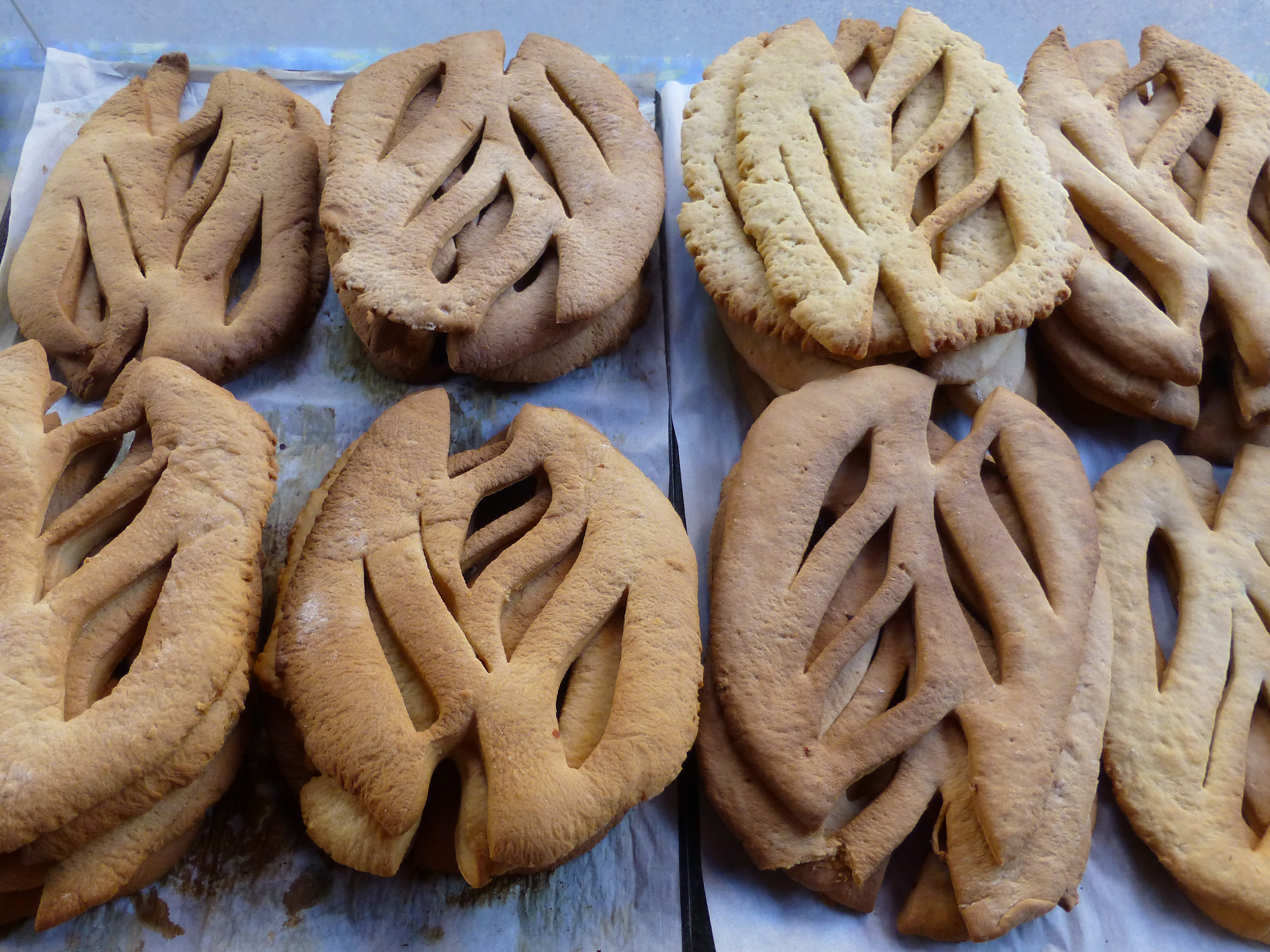 Gibassié de Lourmarin (Vaucluse) : galette provençale à l'huile d'olive